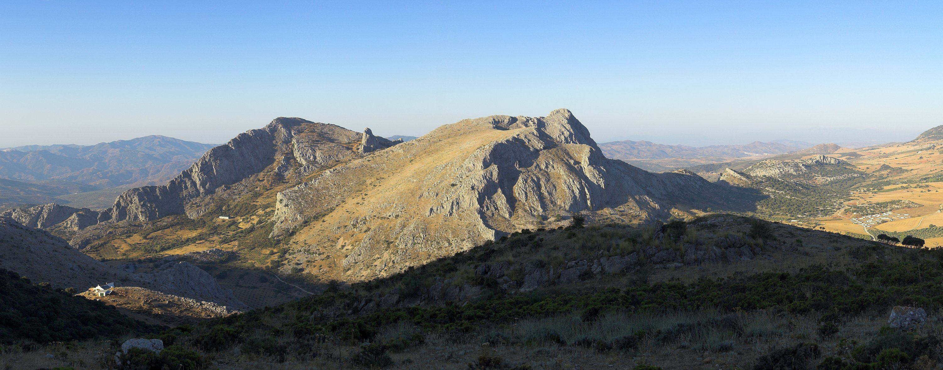 Tajos del Sabar desde la Sierra de Enmedio, Alfarnate.